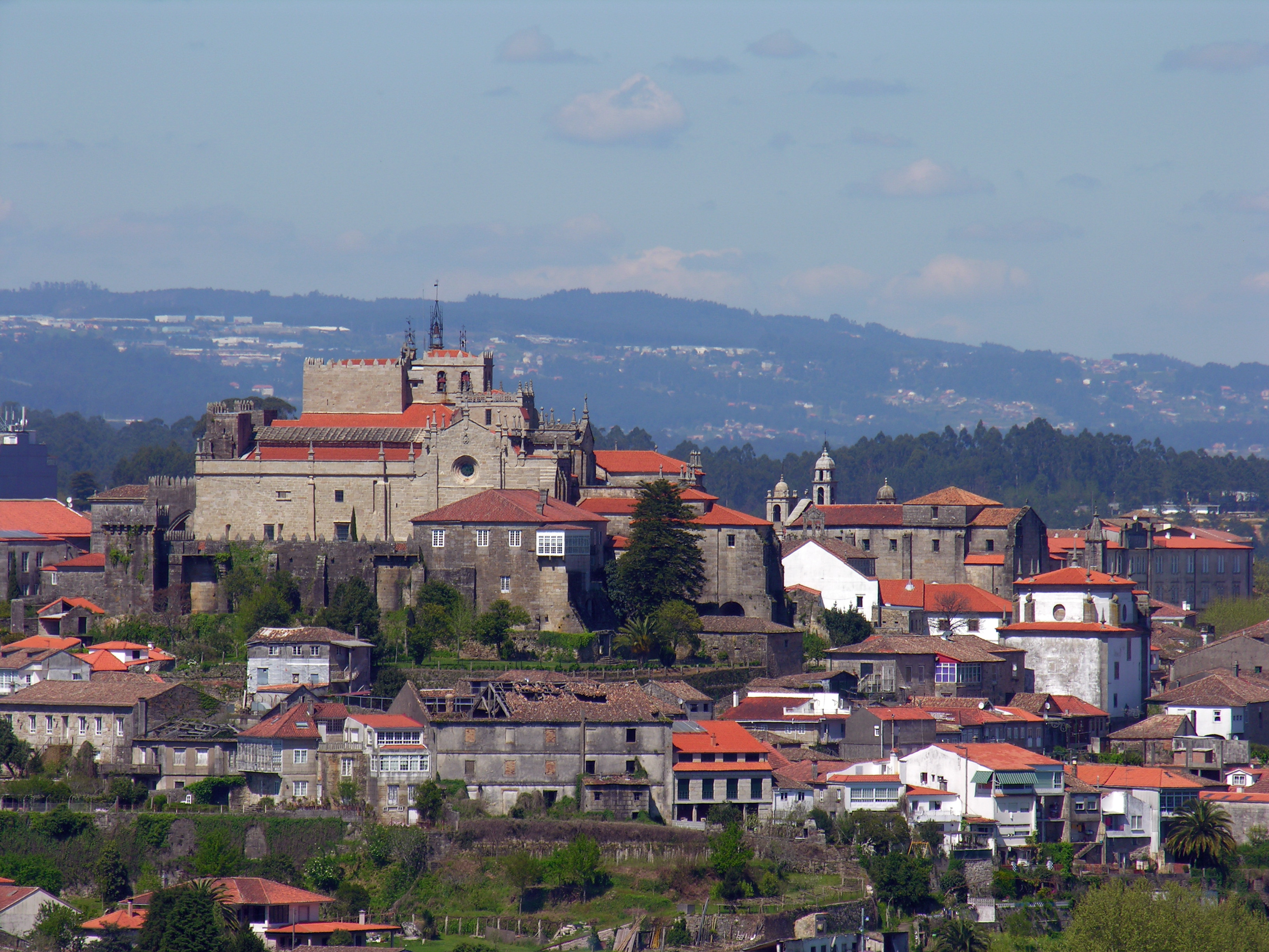 Foto de Tui (Galicia) e do río Miño desde Valença (Portugal. No cumio a catedral de Tui)